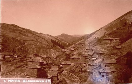 Изглед от с. Мугла, Смолянско.